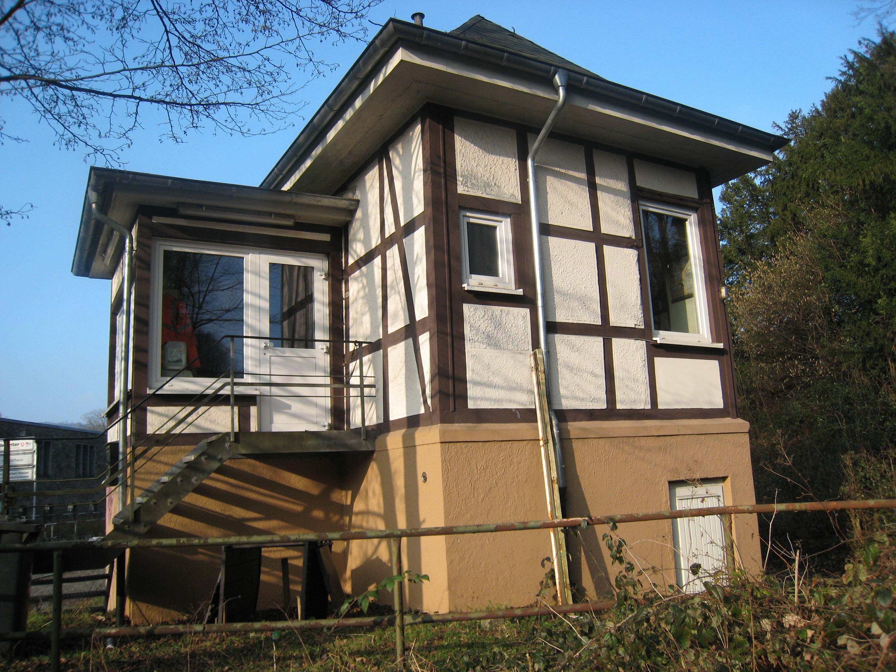 Denkmalgeschütztes Stellwerk in Engelskirchen